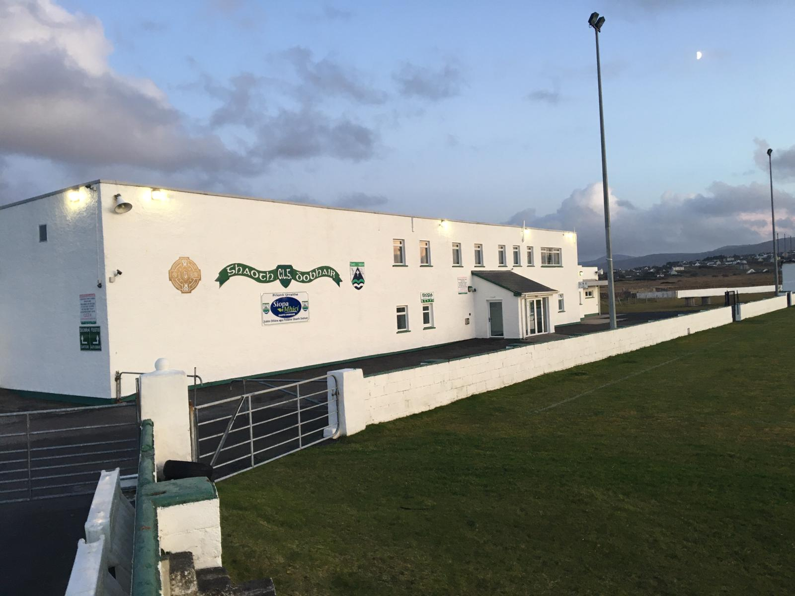 Cumann Lúthchleas Gael Ghaoth Dobhair